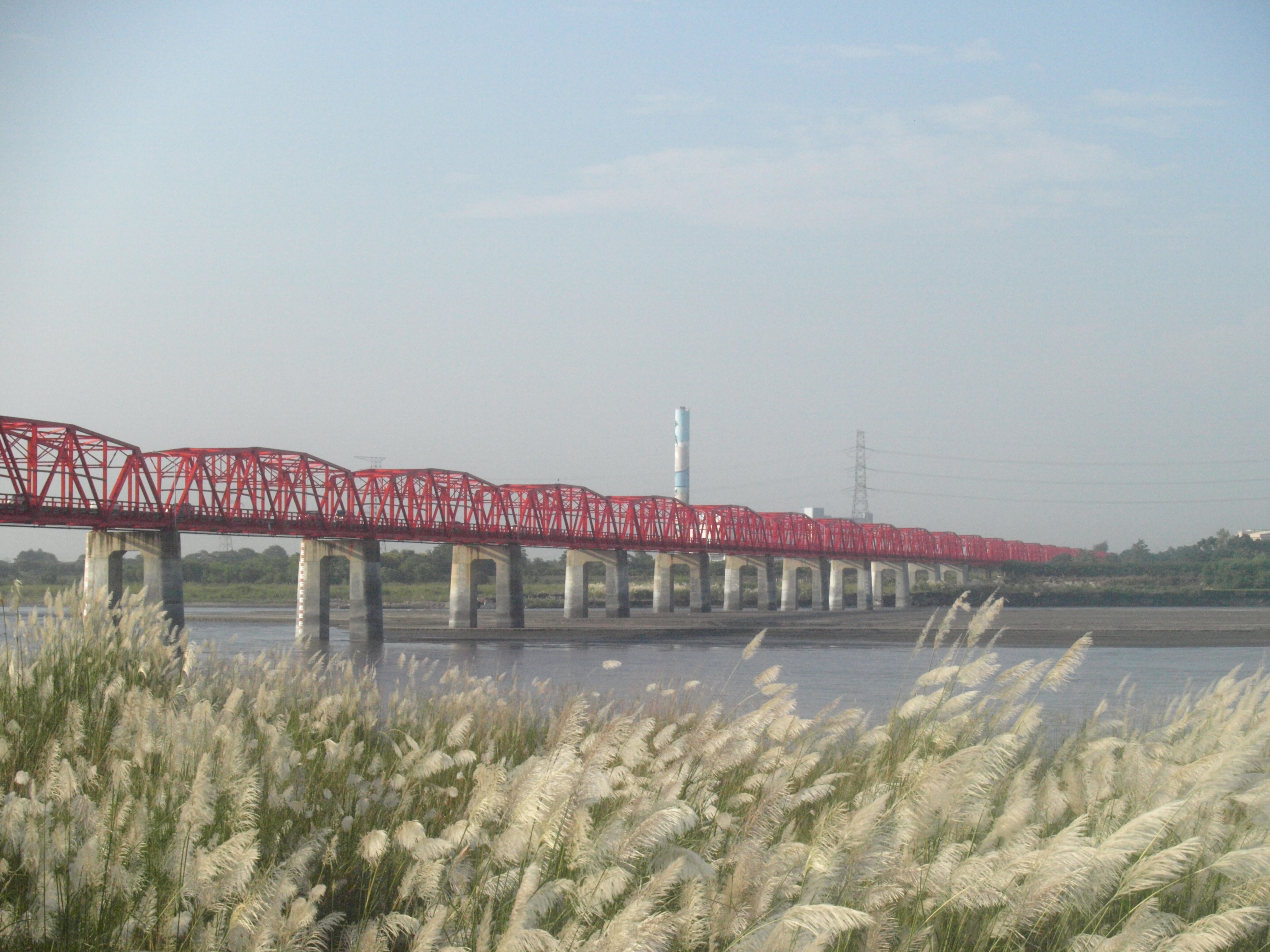 西螺大橋於1937年（昭和12年）開始發包興建，日治時期主要的建設部分為橋墩，方法是先以鐵條綁出橢圓形空心板模，接著灌漿抽沙來加重重量使板模下沉，如此反覆作業，使每座橋墩的基樁高度約二層樓高，32座橋墩於1941年完成，之後因戰爭鋼材挪作他用而中止建設，成為未成道路。國民政府遷台之後，在美援下於1952年5月29日再度開工。